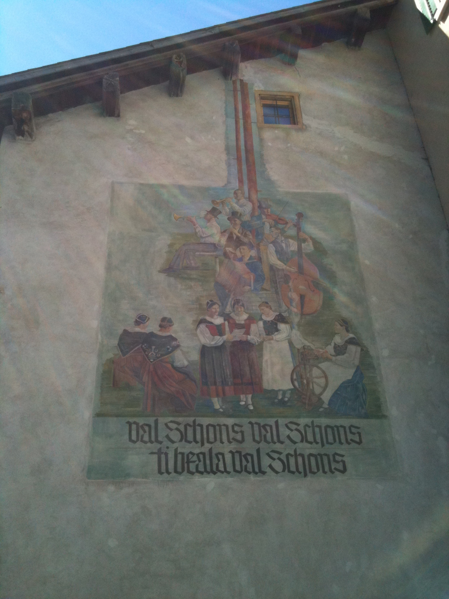 Gemälde auf Haus in Andeer im Schams, Kanton Graubünden